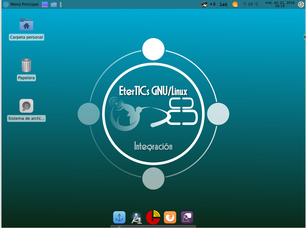 Pantallazo de la distribución